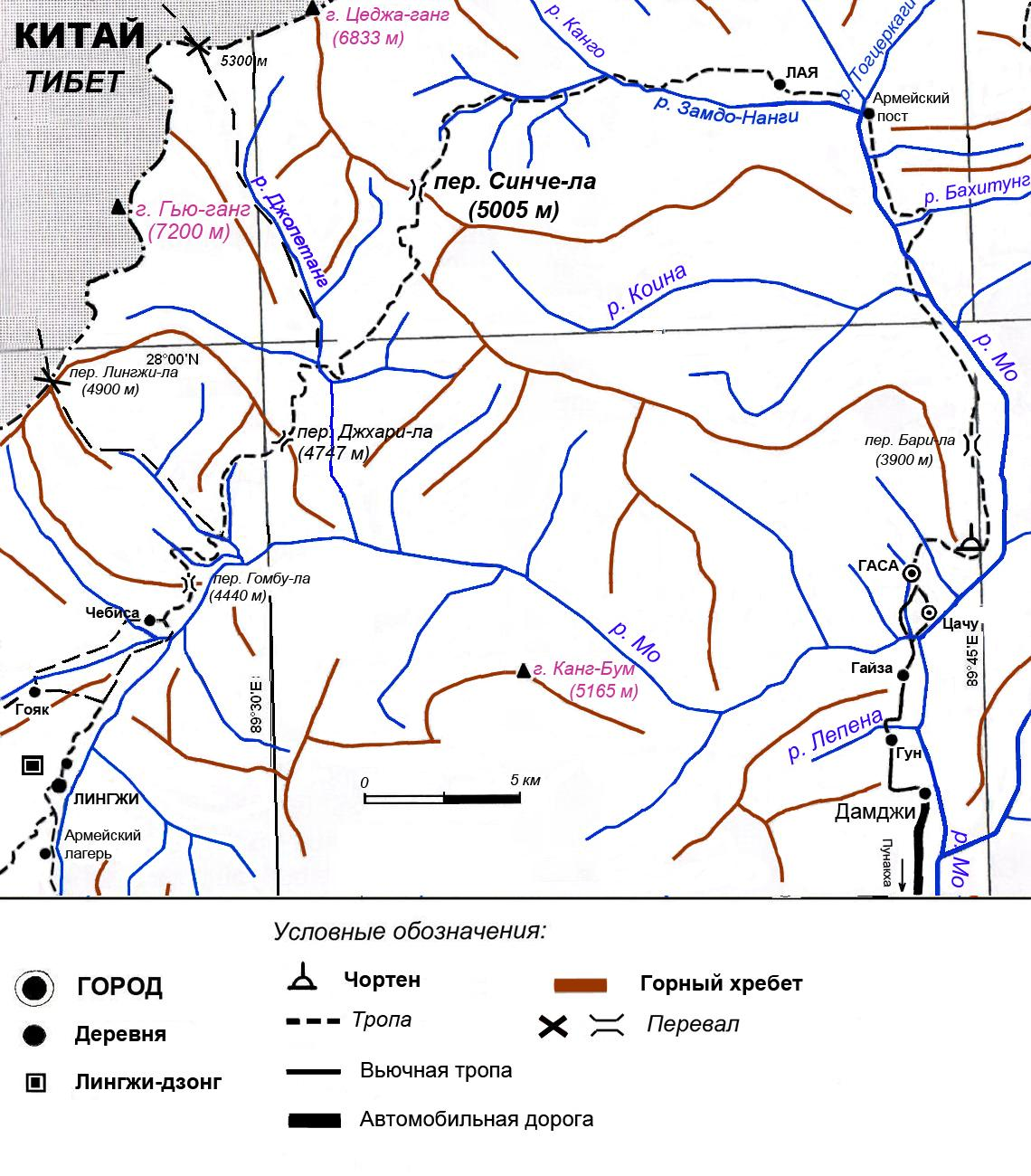 Горные тропы Бутана